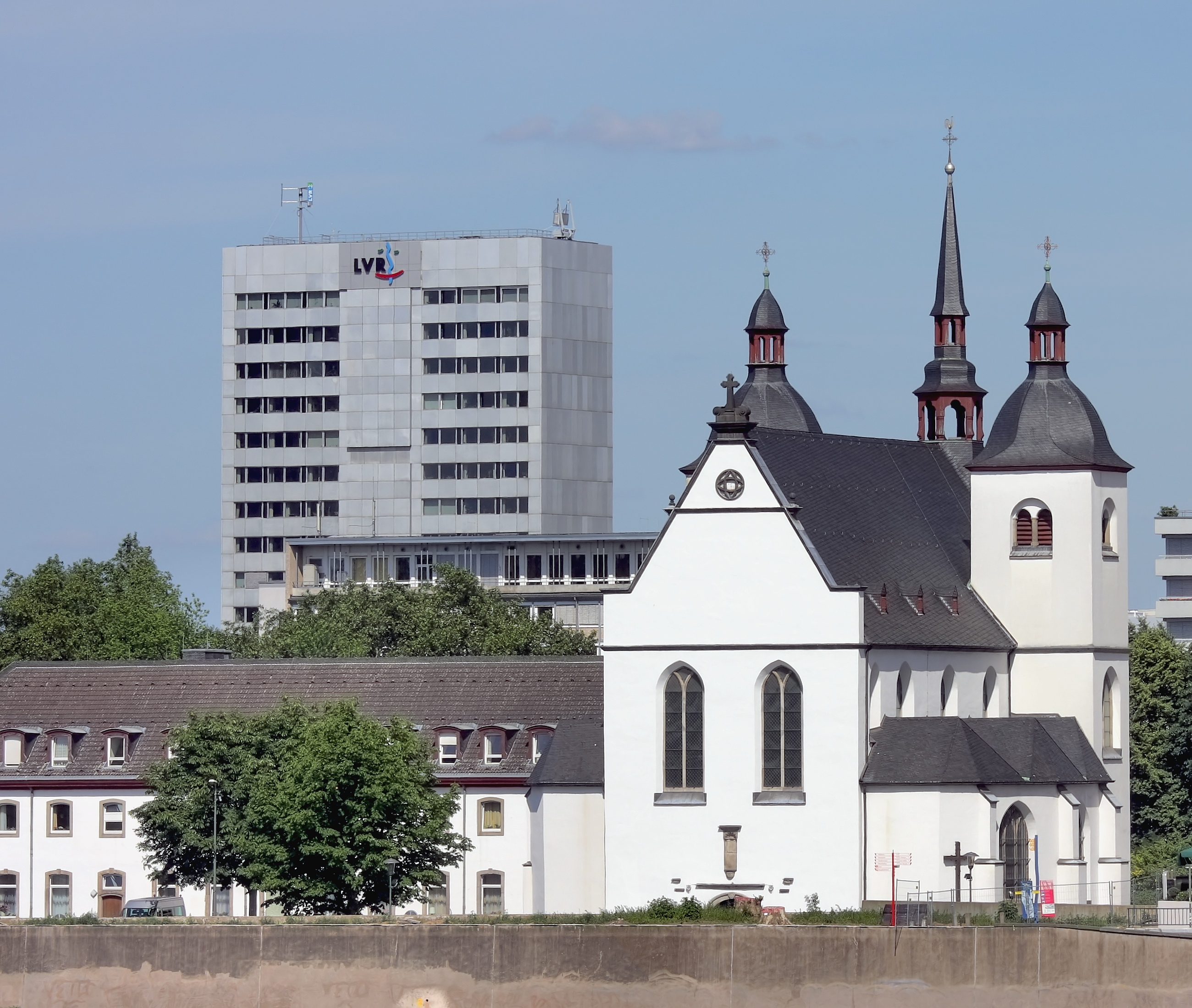 Alt St. Heribert, Köln-Deutz. Die Kirche wird von der griechisch orthodoxen Gemeinde genutzt und nennt sie nach ihrem Patrozinium am 15. August „Entschlafen der Gottesmutter“. Ansicht von der linksrheinischen Seite. Gebäude links der Kirche: Die ehemalige Abtei Deutz, heute das Caritas Altenzentrum Sankt Heribert. Im Hintergrund: LVR-Hochhaus.